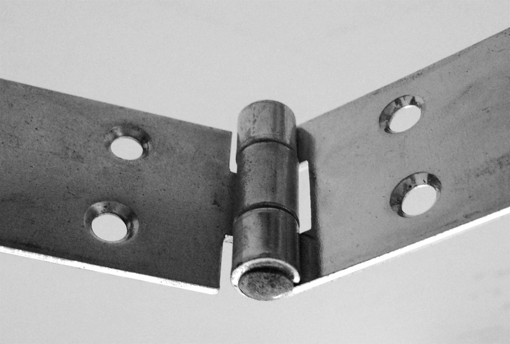 Scharnier